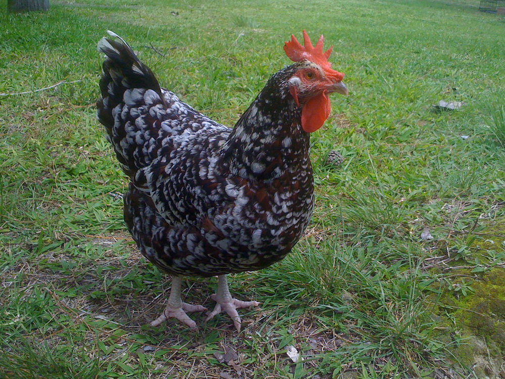 Speckled Sussex Hen named Mata Hari.